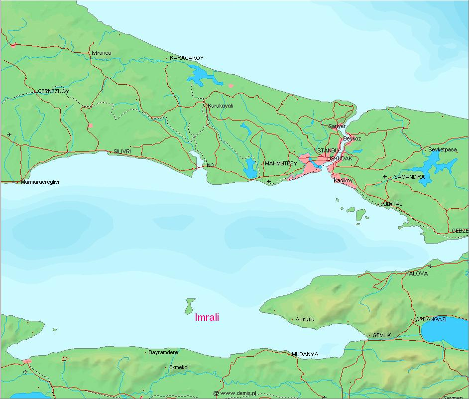 Aus : With this statement DEMIS BV grants you permission to freely copy the PNG images returned by our server and use them for your own purposes, including web pages. We would appreciate a reference to our server but such a reference is not required, nor do we take responsibility for the accuracy or quality of the maps.